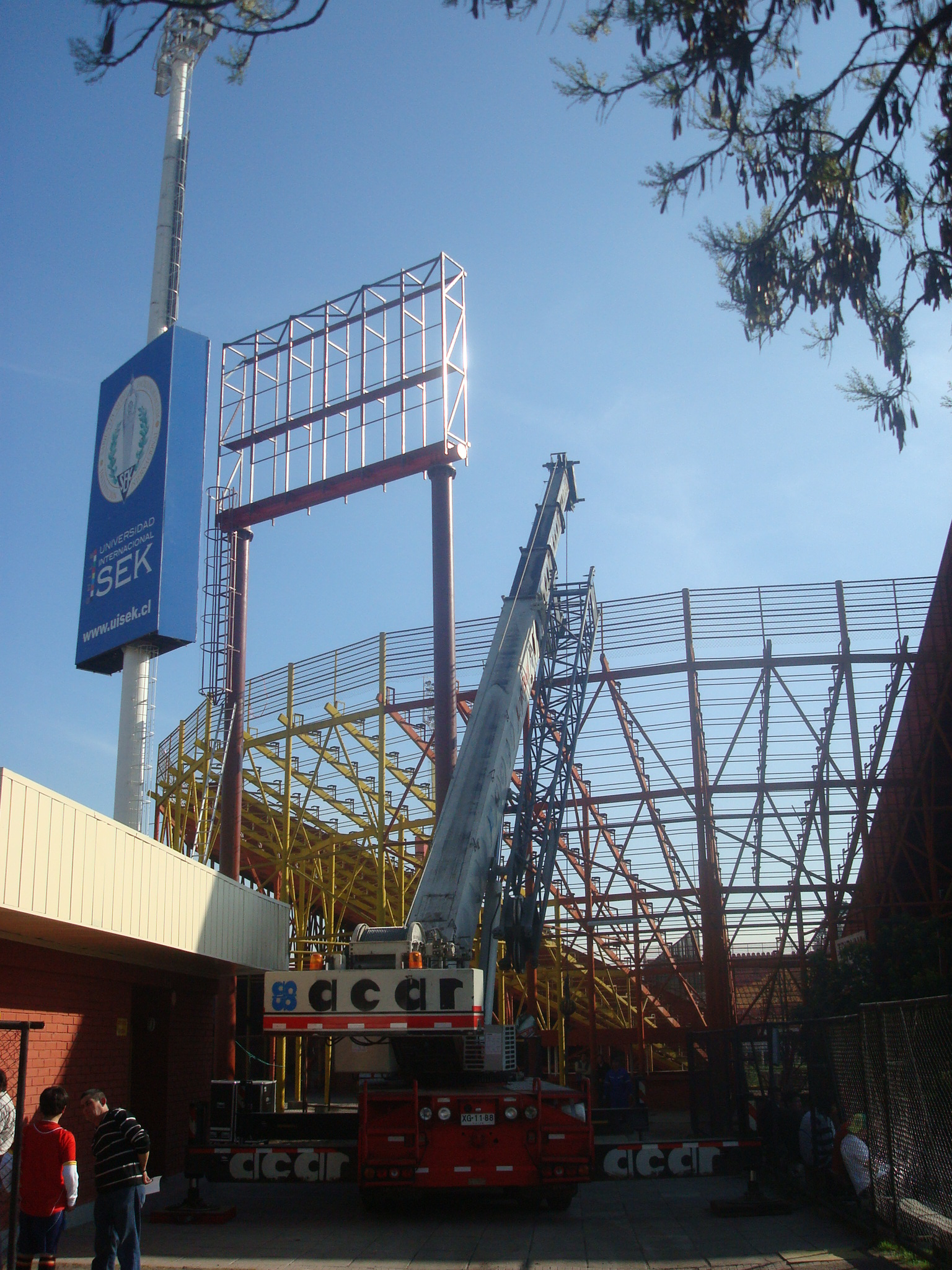 Instalación de pantalla gigante en el Estadio Santa Laura, Independencia, Santiago de Chile